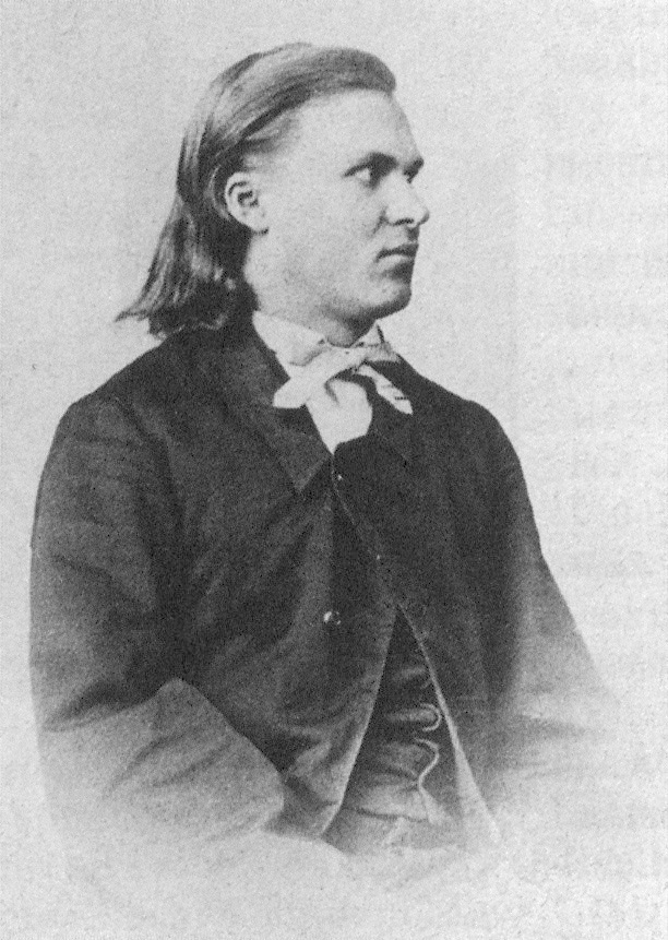 Friedrich Nietzsche, 17 years old in Naumburg